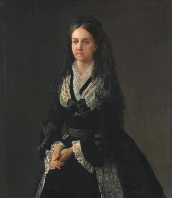 Ге Николай. Портрет Варвары Александровны Кочубей (1829-1896), урожд. Кушелева-Безбородко